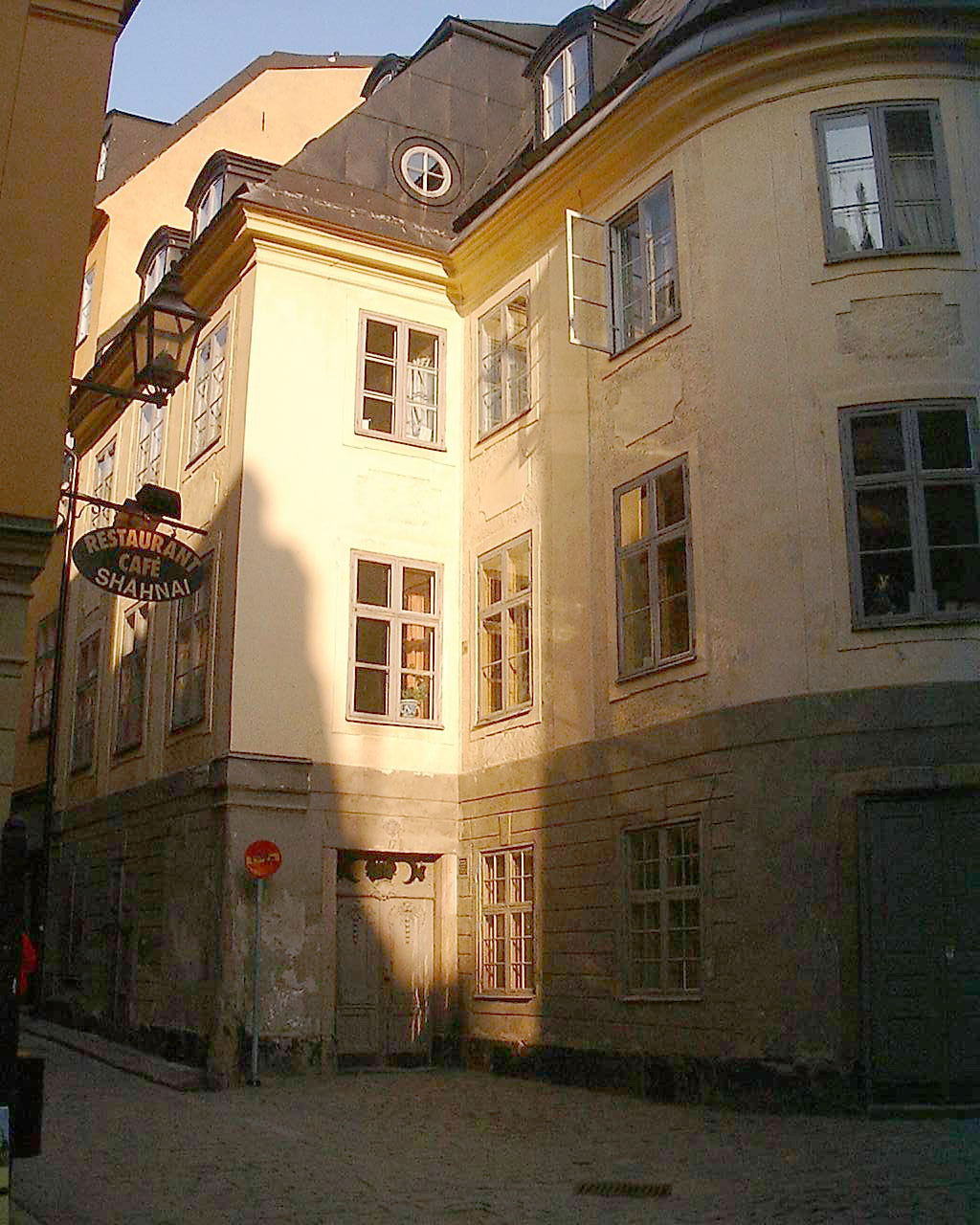 13, Kindstugatan (Cassiopea 1), Gamla stan, Stockholm.